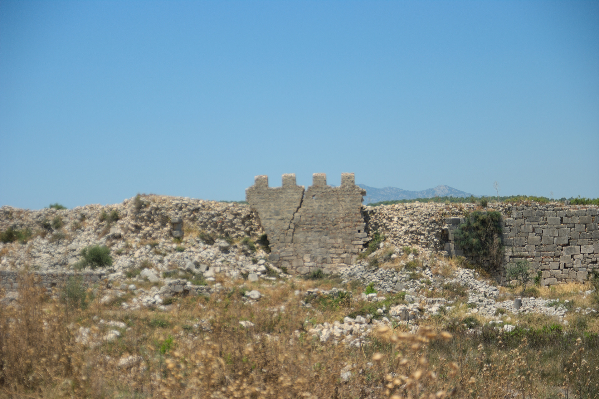 Патара. Остатки укреплений 2